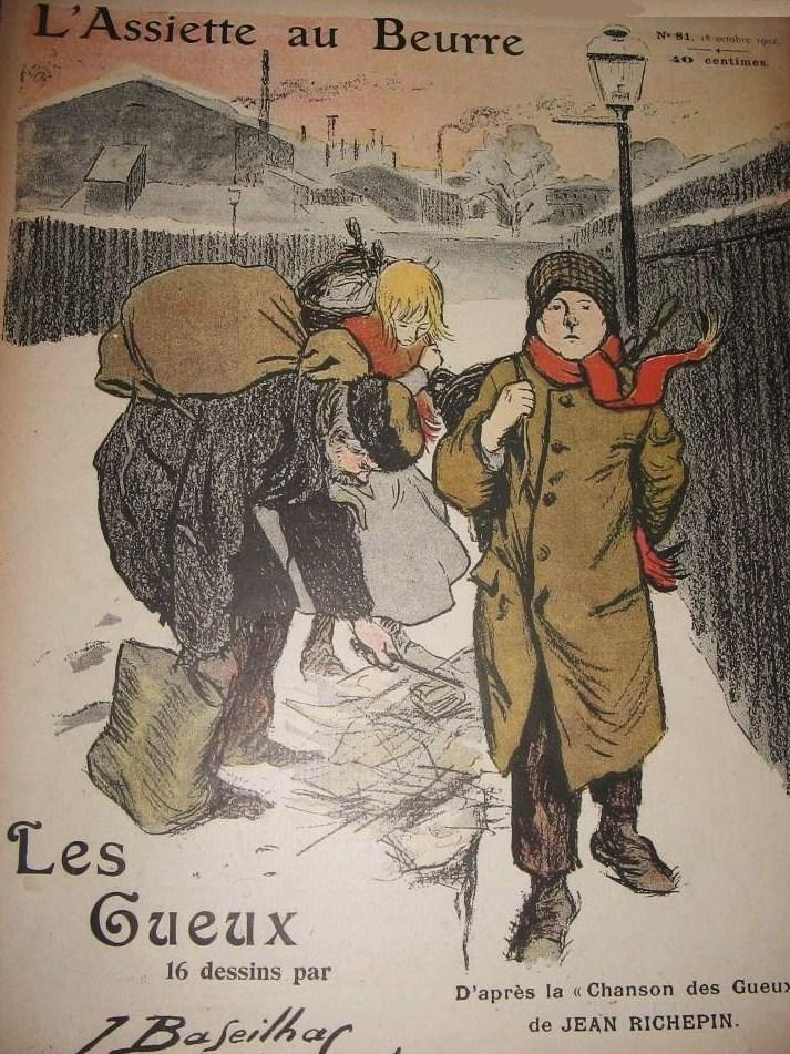 L'Assiette au beurre numéro spécial « Les Gueux » par Jacques Baseilhac, 18 octobre 1903.